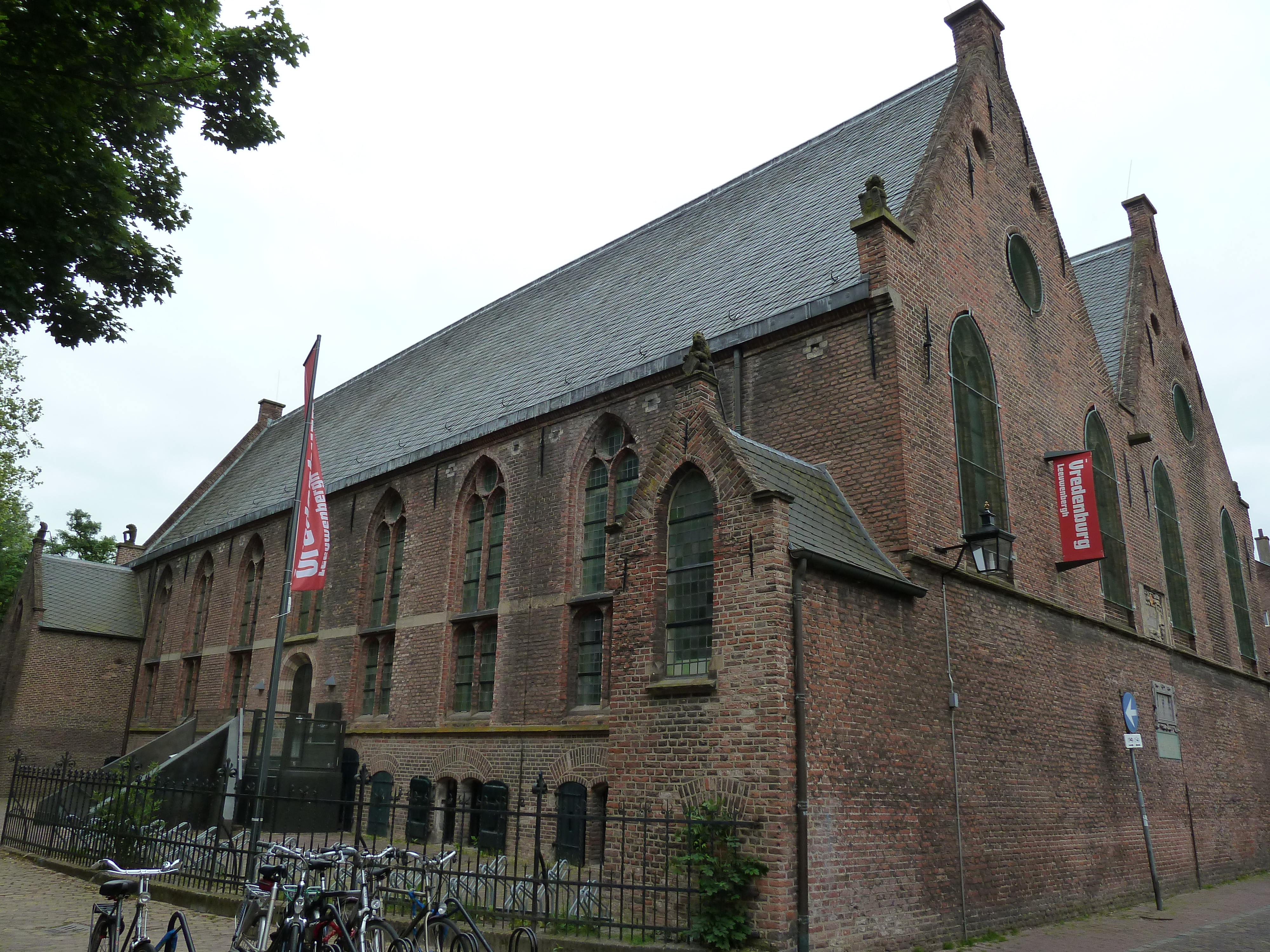 Leeuwenberghkerk Leeuwenbergkerk Leeuwenbergh Gasthuis Servaasbolwerk Utrecht